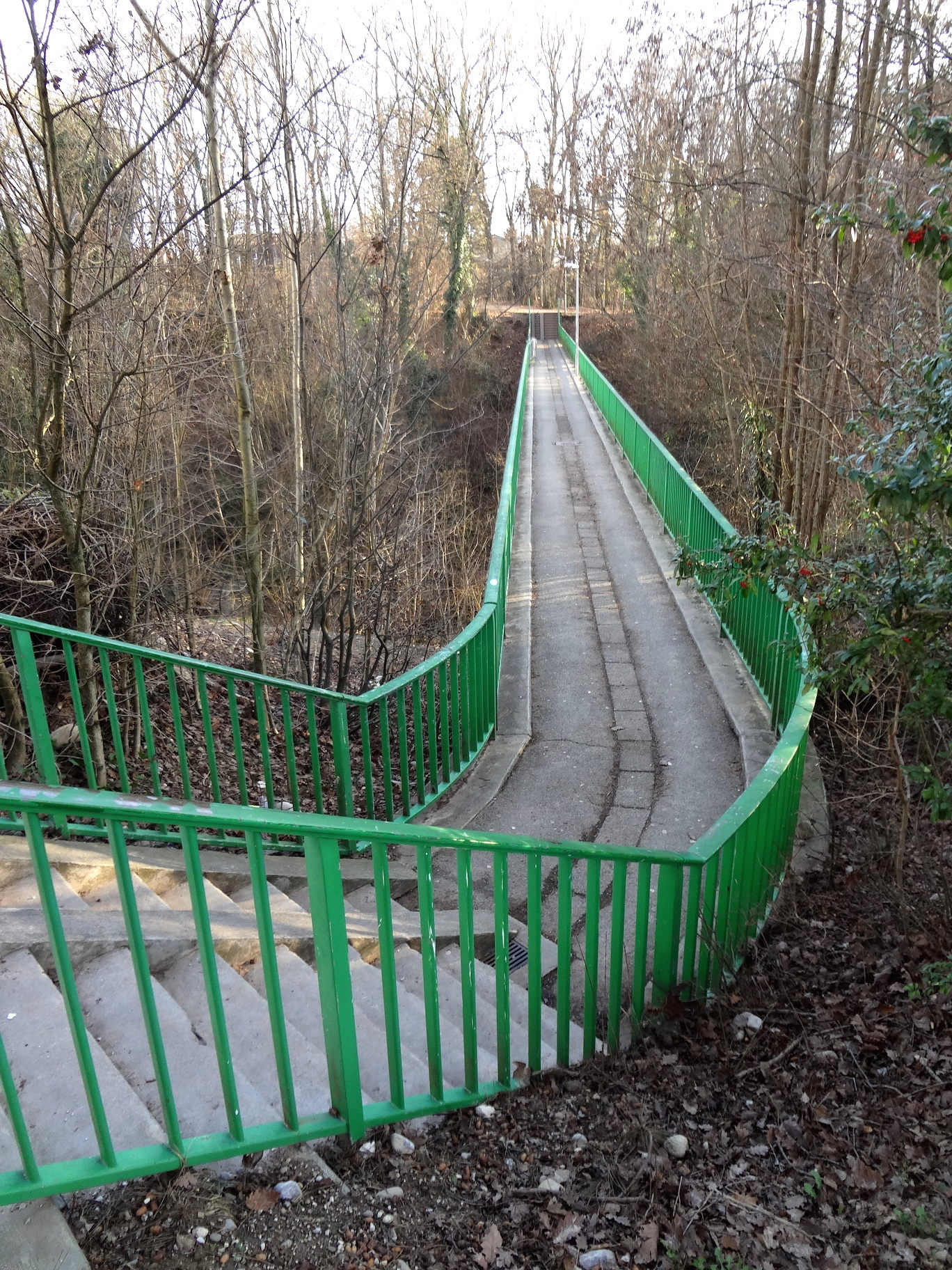 Passerelle au-dessus du Nant des Grebattes, commune de Vernier, entre Le Lignon et Aïre. Cette passerelle fait partie de la « Voie-Verte » de Vernier.